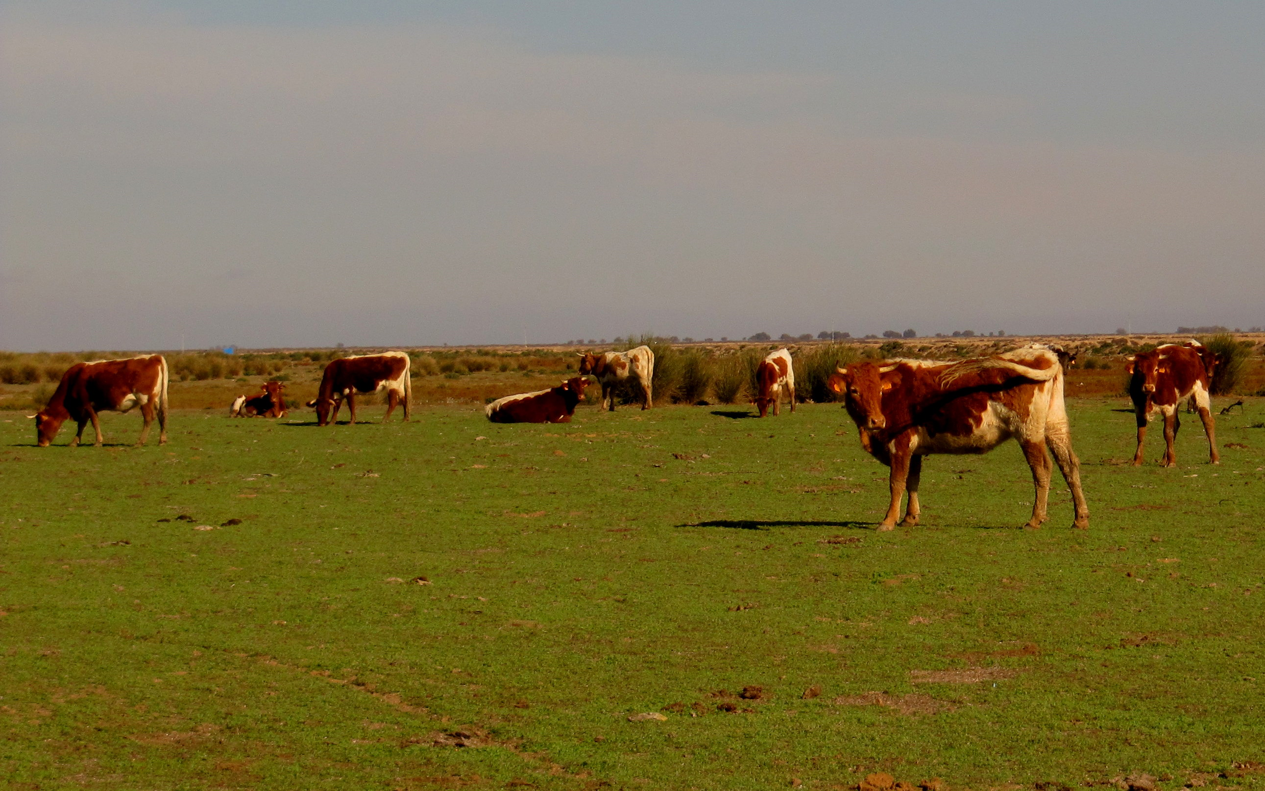 Ganado en la marisma de Sanlúcar de Barrameda